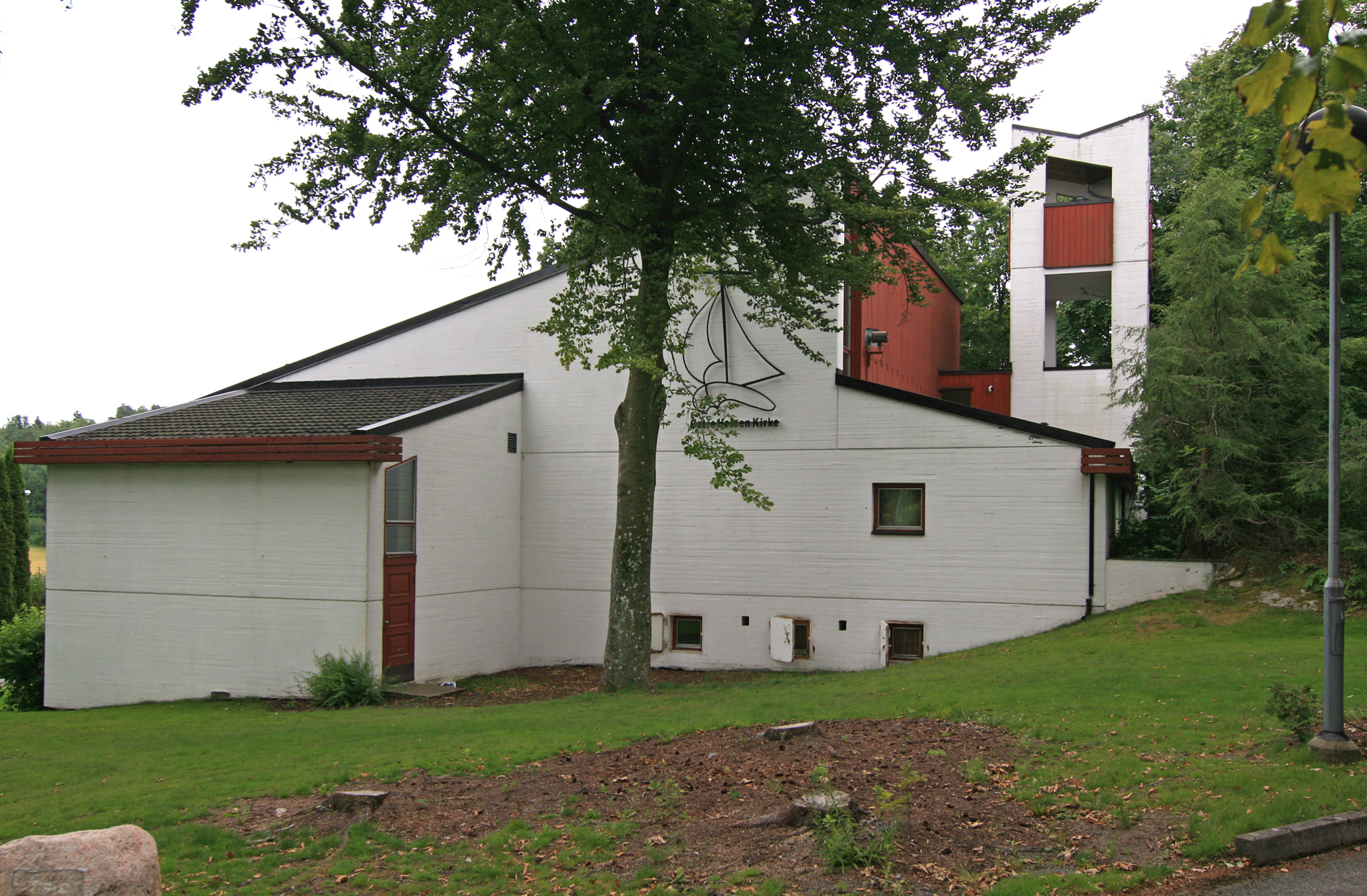 Østre Halsen kirke, Larvik.